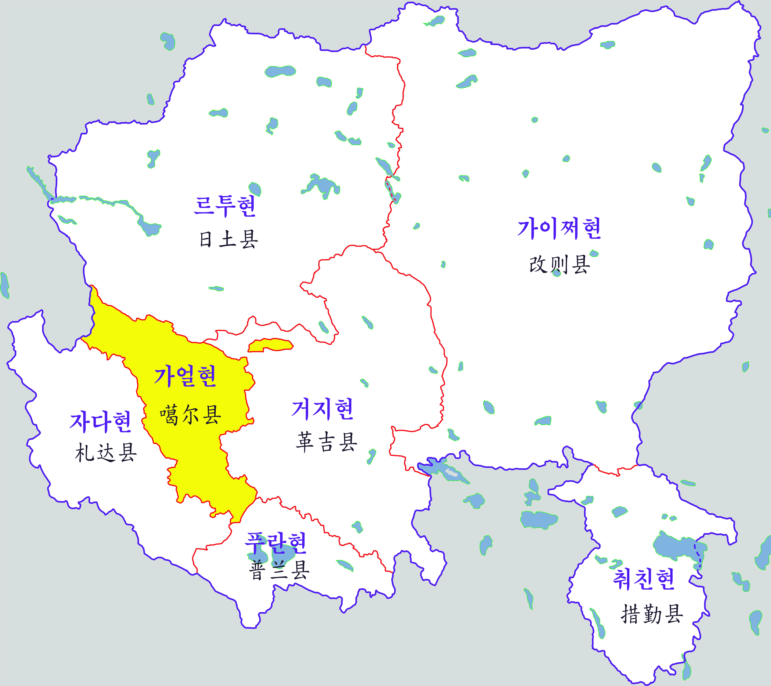 아리지구 행정지도